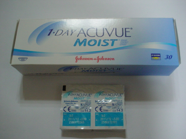 1DAY ACUVUE MOIST (JAPAN)